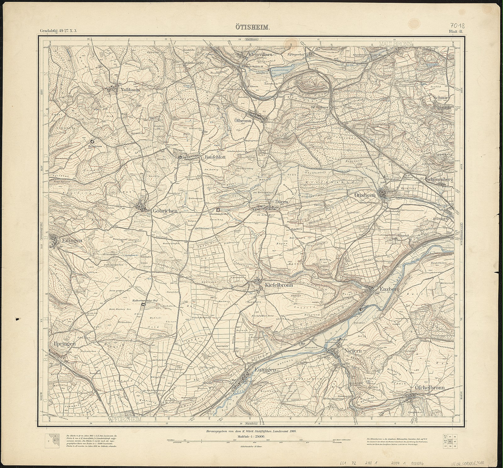 Messtischblatt